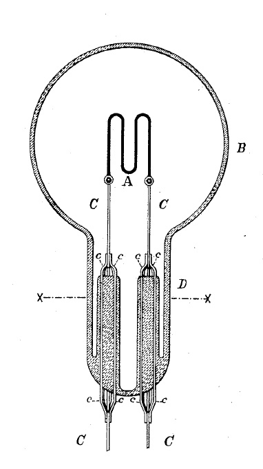 Zeichnung aus US-Patent 244277 von 1881. Typische frühe Kohlefadenlampe der United States Electric Lighting Company mit Carbon in M-Form nach dem Chefentwickler Hiram Maxim